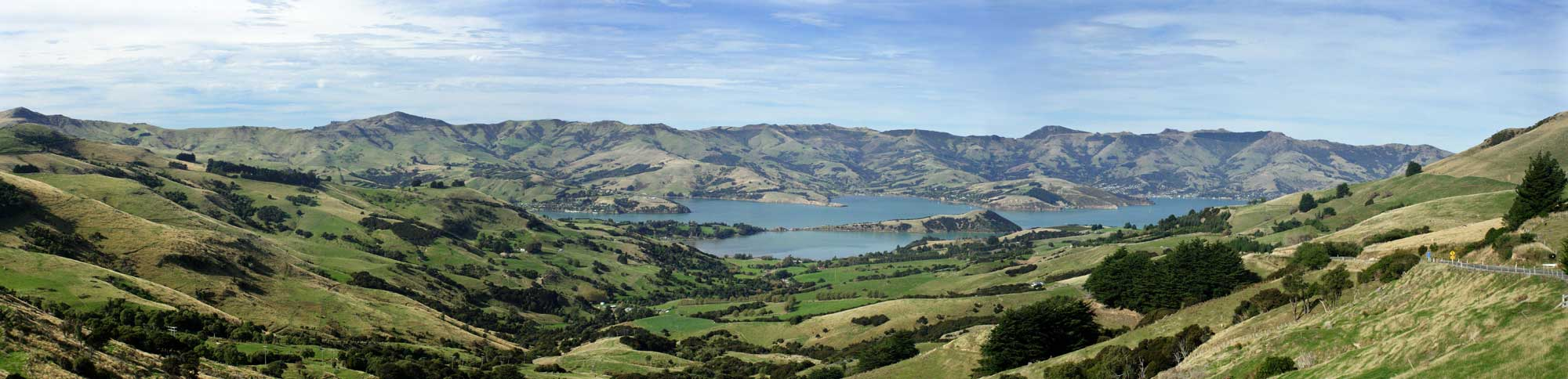 Panoramablick auf Akaroa, vom "Sign of the Kiwi"